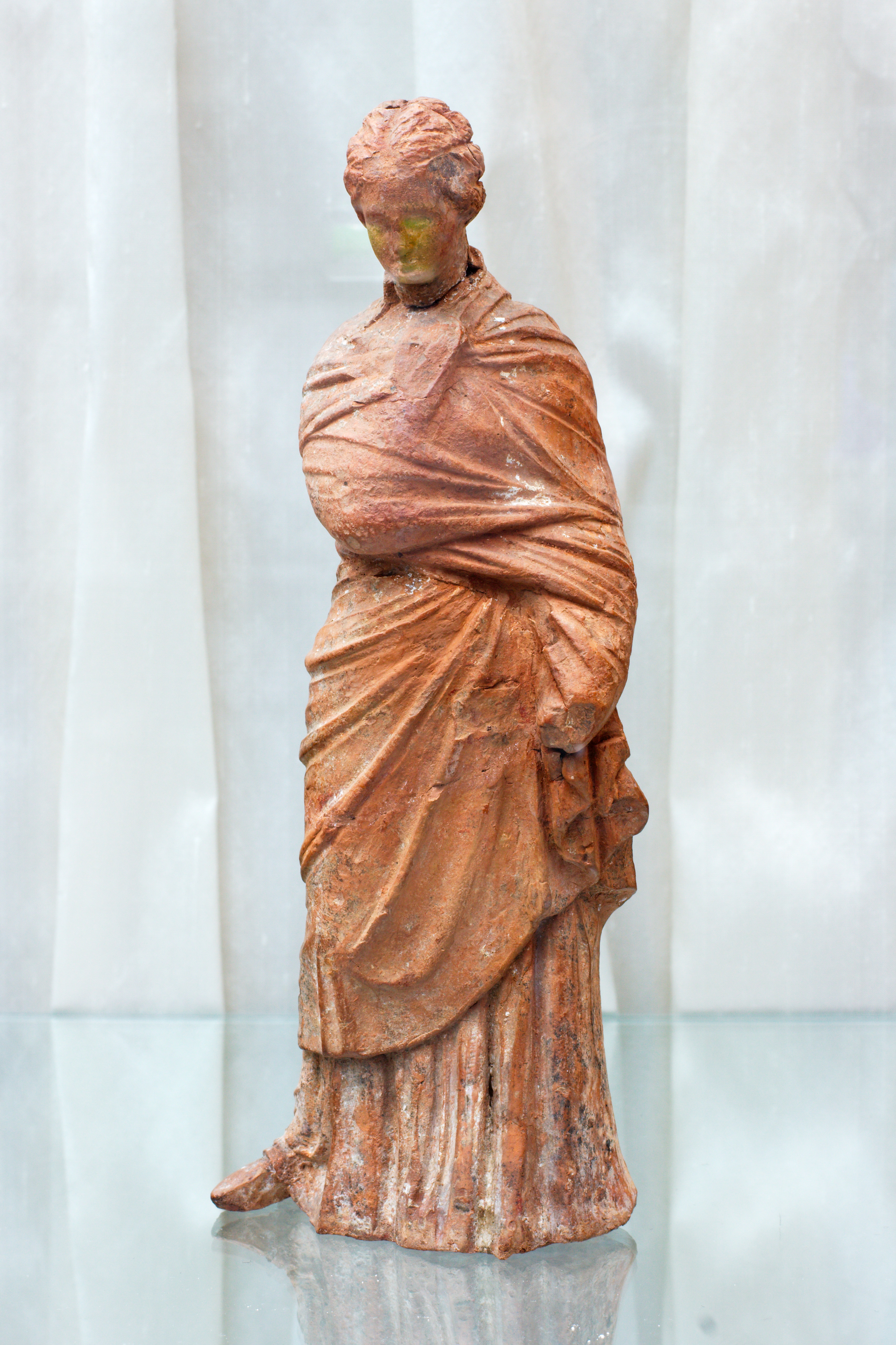 Griechische Terrkotta .